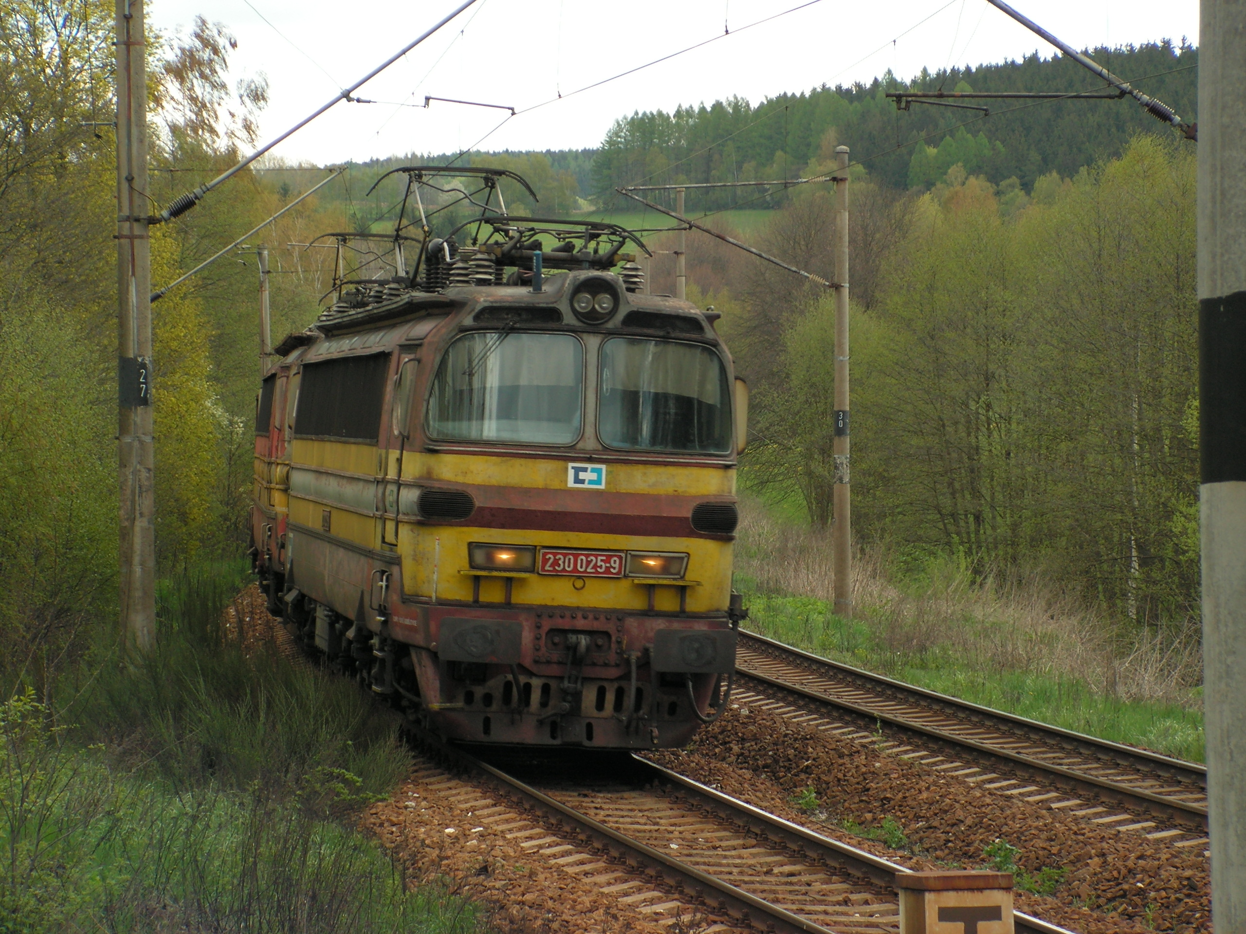 Střídavá elektrická lokomotiva 230.025-9 ČD Cargo nedaleko stanice Světlá nad Sázavou.